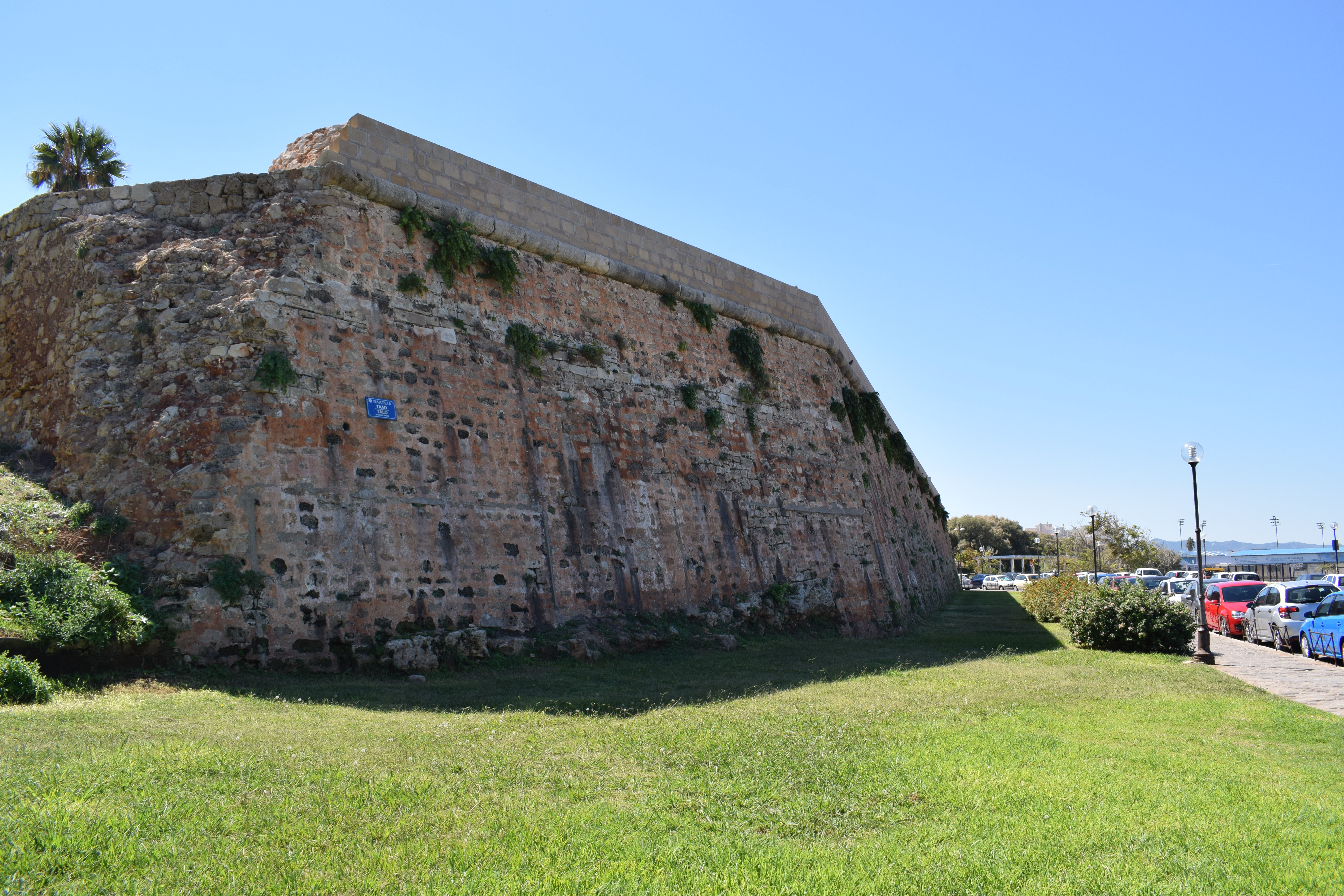 Ενετικά τείχη Χανίων«Ενετικά τείχη Χανίων»